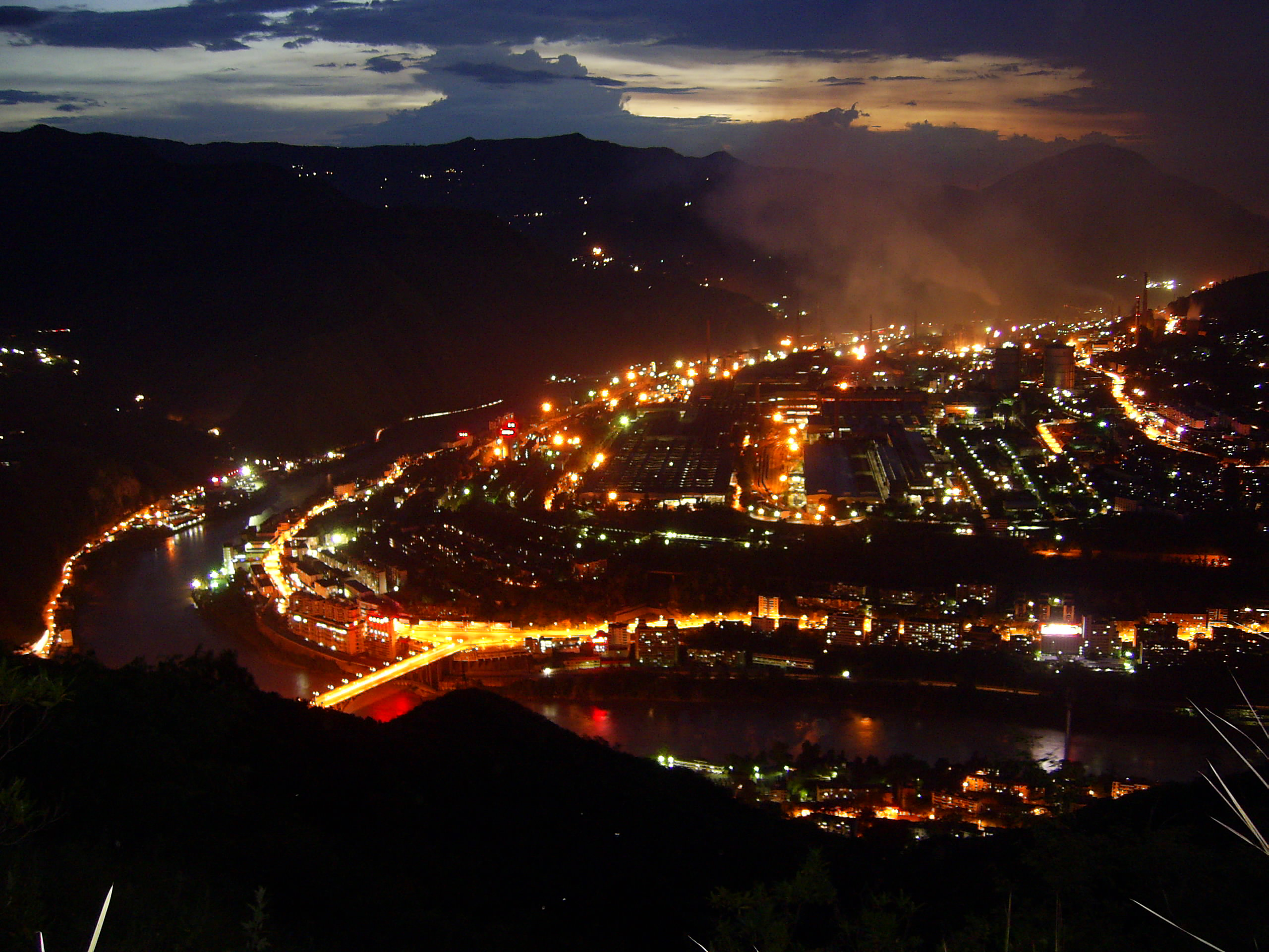 攀钢弄弄坪主厂区夜景